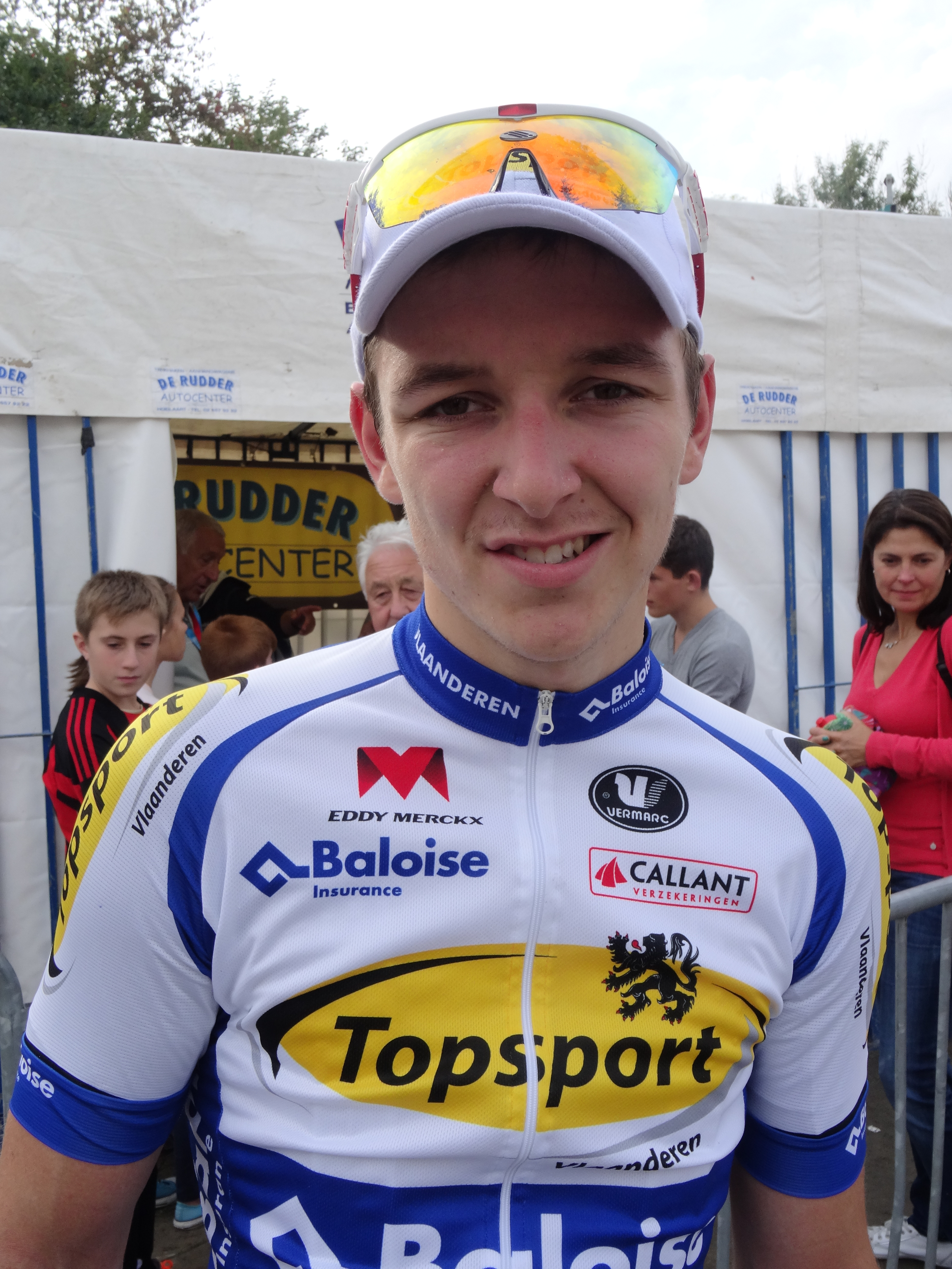 Reportage photographique réalisé le mercredi 27 août à l'occasion de l'arrivée de la Druivenkoers Overijse 2014 à Overijse, Belgique.